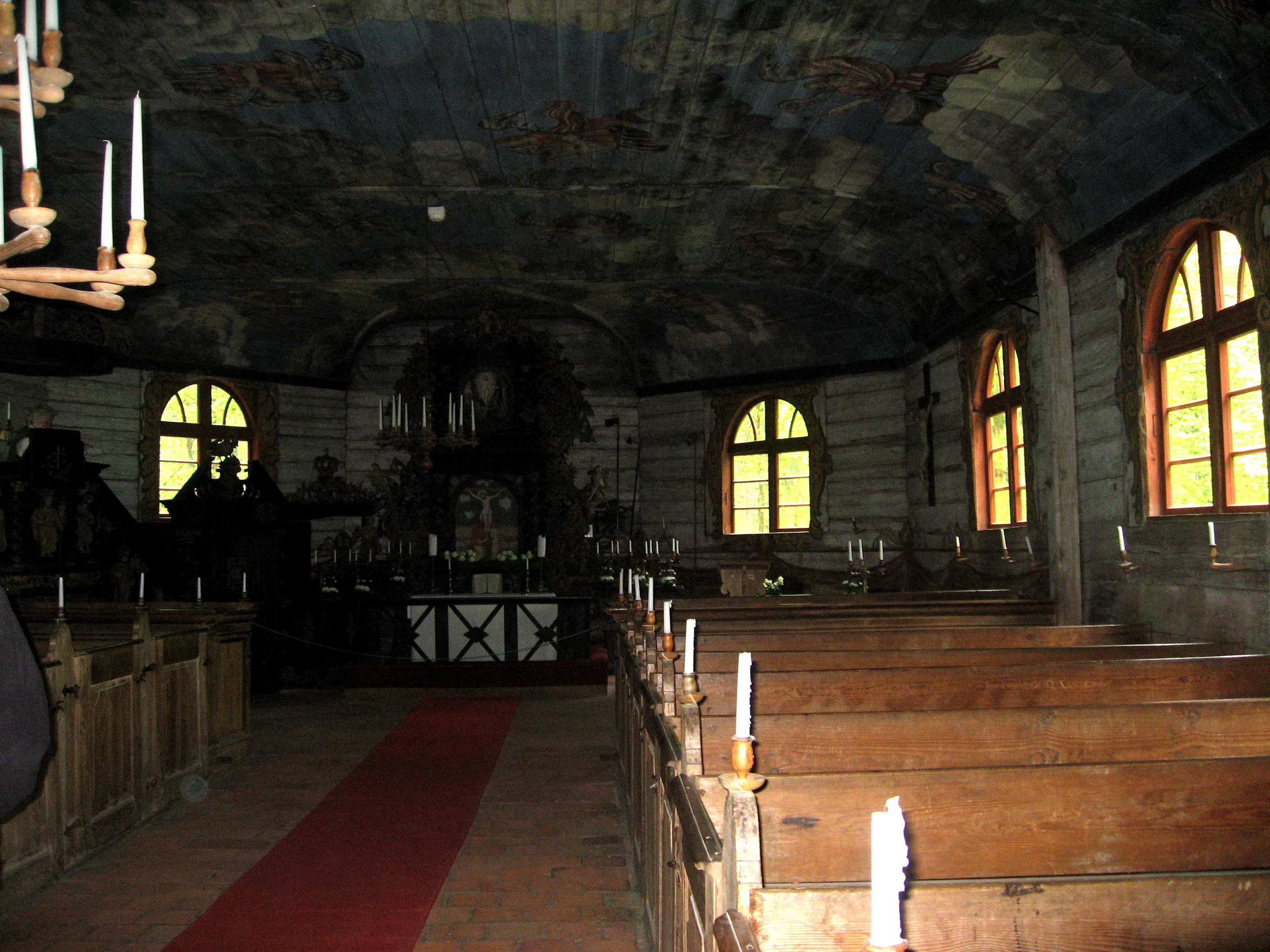 Lotyšské etnografické muzeum v přírodě: Luteránský kostel (interiér), oblast Kurzeme, Renda, Usma, postaven 1704